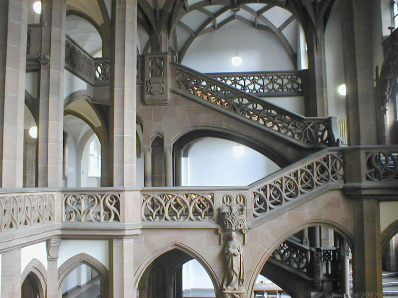 Treppenhaus im Amtsgericht Wedding